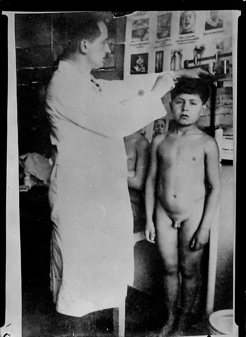 Georg Benjamin 1927 als Schularzt im Bezirk Berlin-Wedding